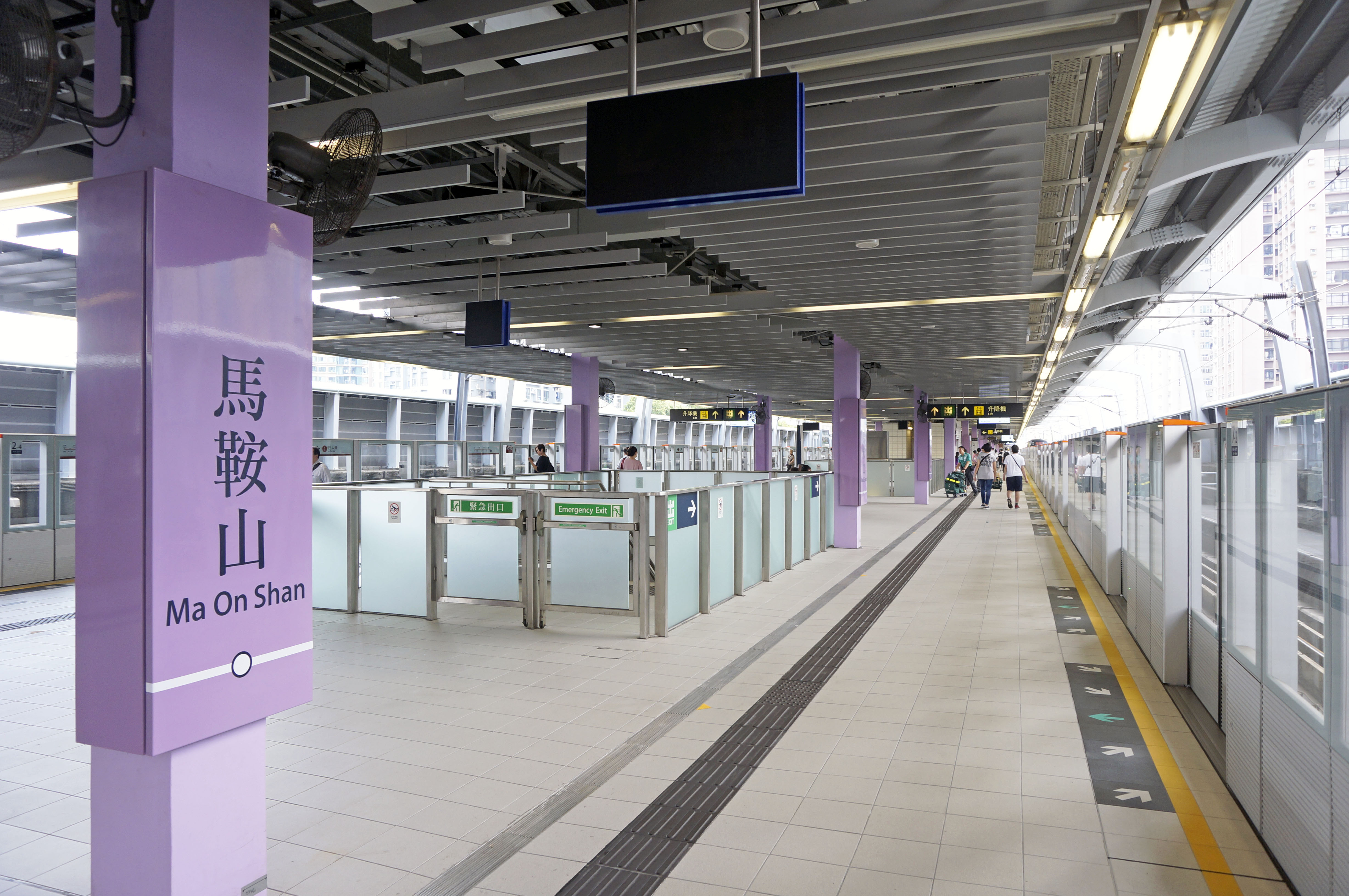 港鐵馬鞍山站月台